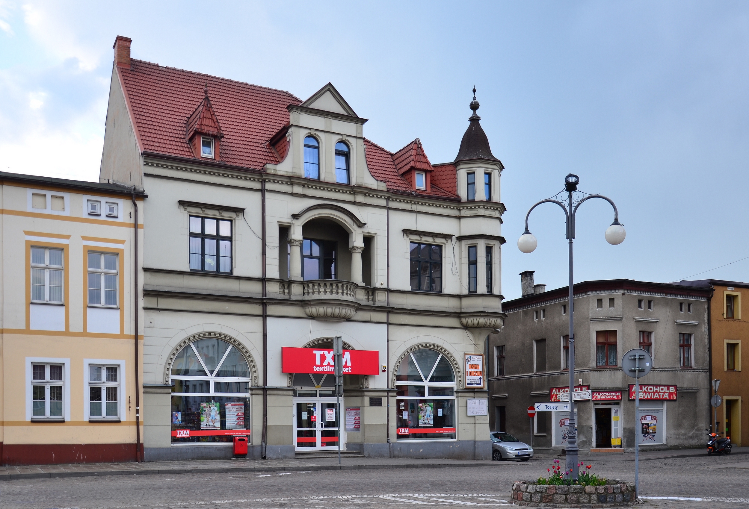 Rynek 2, kamienica, do 1920 drukarnia, po 1921 redakcja gazety "Drwęca"